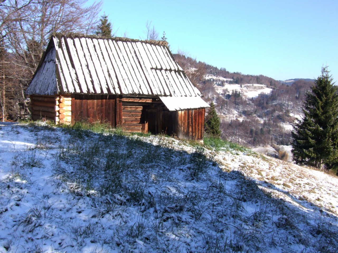 Szałas na Borsuczynach (Gorce)